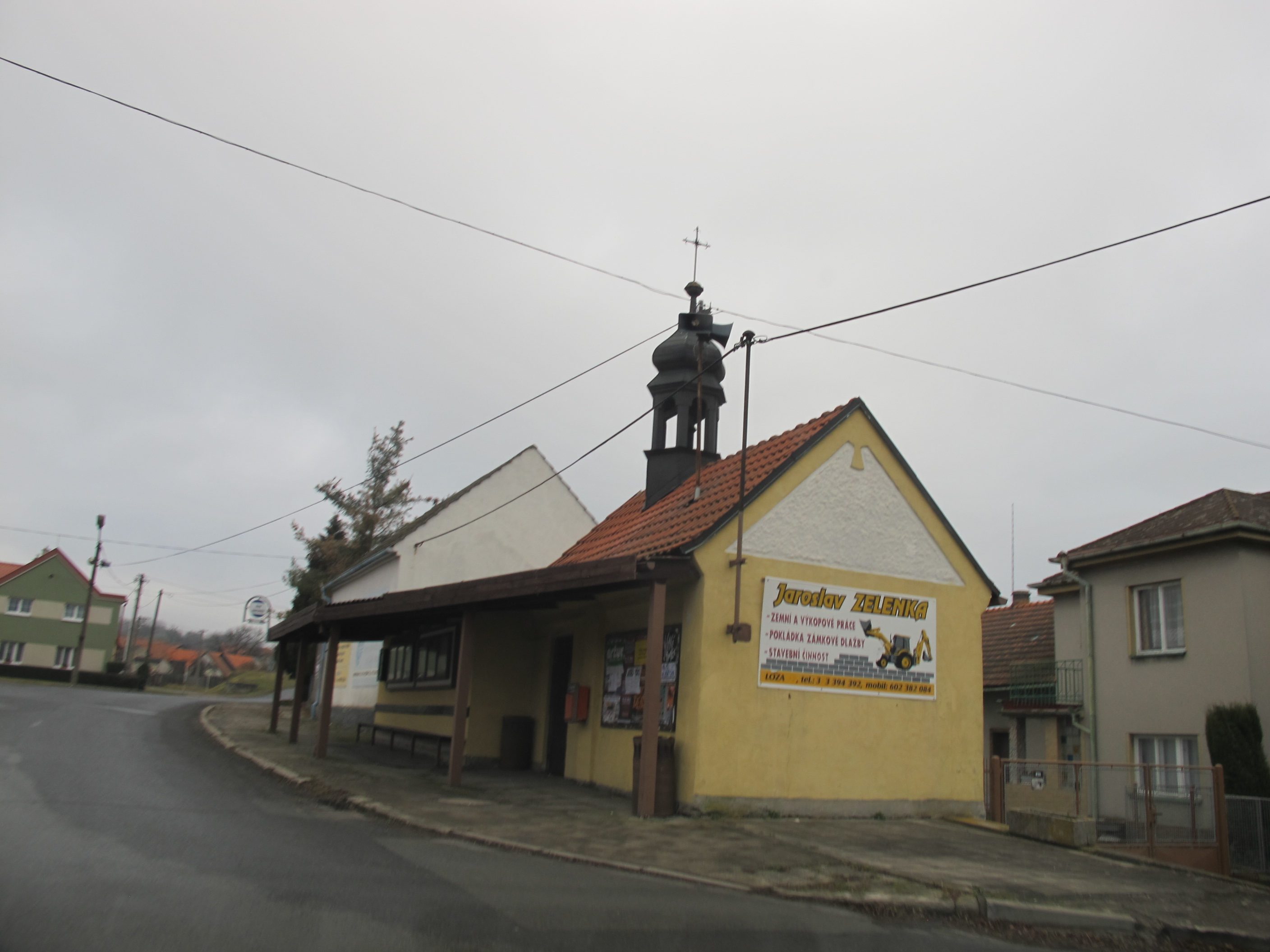 Kaple v obci s přistavěnou autobusovou zastávkou.